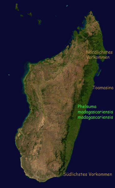 Vorkommen von Phelsuma madagascariensis madagascariensis Die terra typica ist Tamatava (Toamasina). Das Vorkommen erstreckt sich entlang der regen- und vegetationsreichen Ostküste von Taolanaro im Süden bis zur Halbinsel Masoala im Norden der Ostküste.